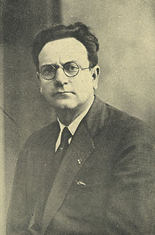 Saverio Dioguardi, architetto e imprenditore edile pugliese, unisce alla conoscenza dei materiali e delle tecniche di costruzione doti di progettista e grafico. Realizza edifici pubblici e di rappresentanza, costruisce e ristruttura sedi di enti pubblici, banche, caserme, case popolari, scuole e numerose opere di carattere monumentale funerario.